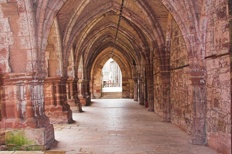 Luxeuil-les-Bains, Cloister